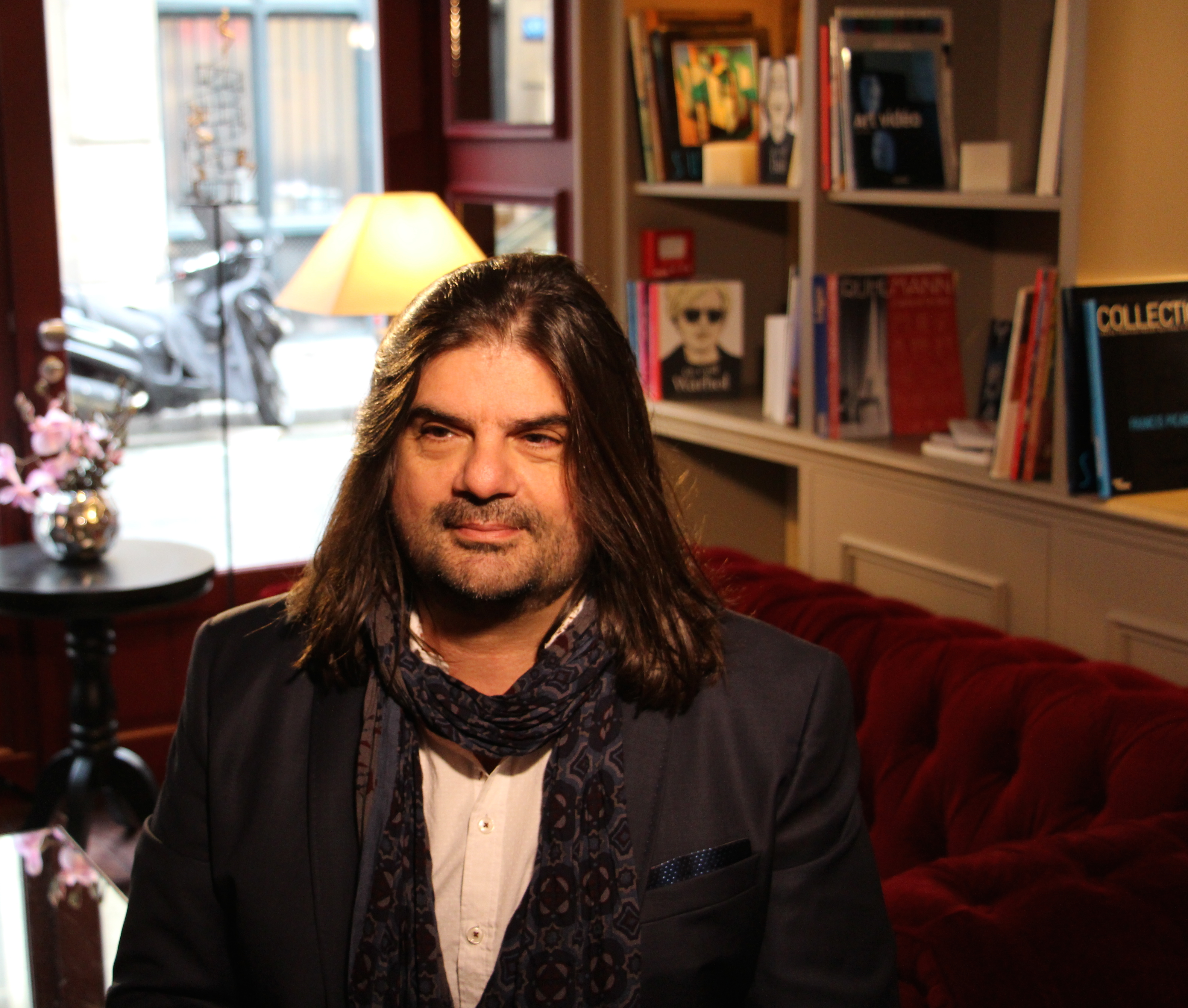 Portrait de Jean-Pierre Como. Pianiste et compositeur. Paris.